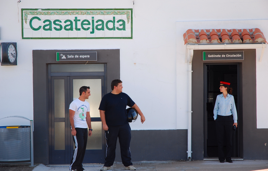 Estación de tren de Casatejada (Cáceres)